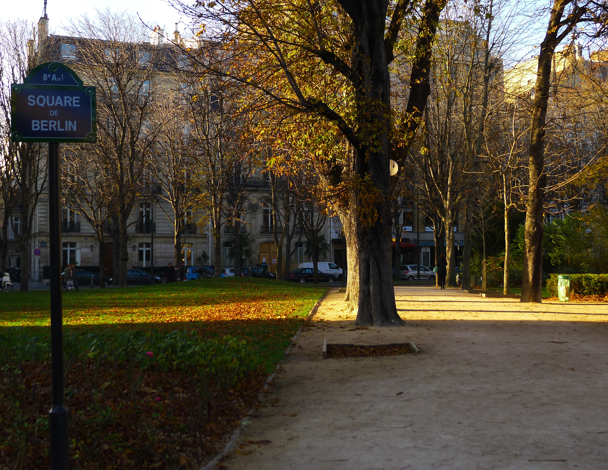 Square de Berlin - Paris VIII